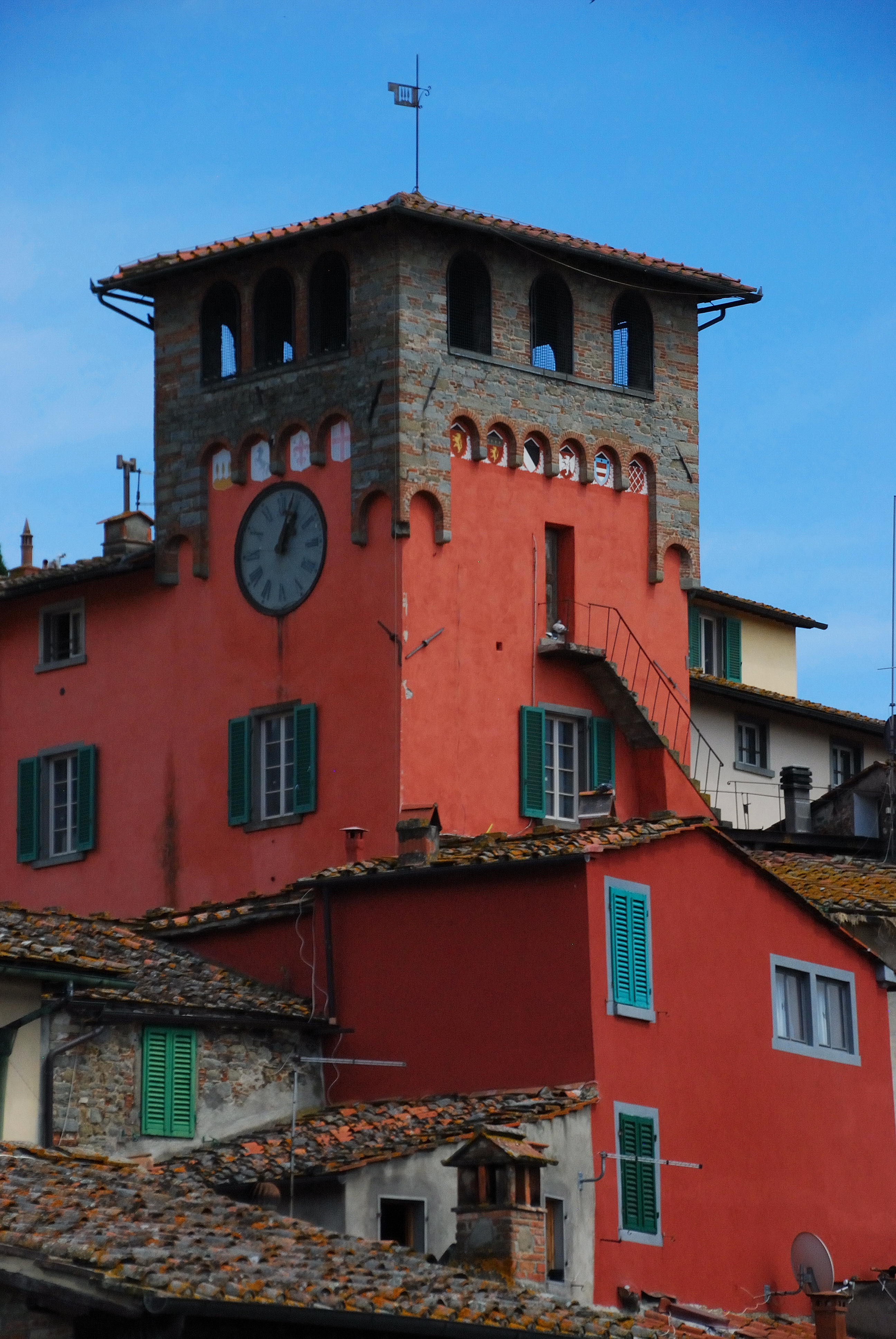 Loro Ciuffenna